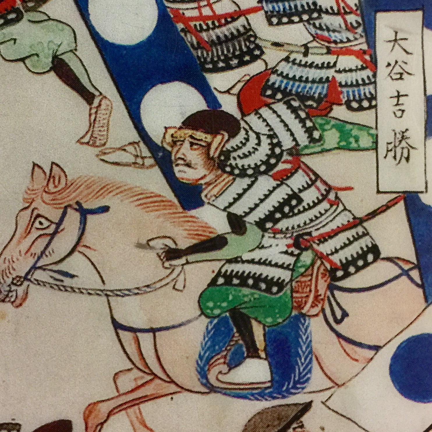 関ヶ原合戦図屏風（関ケ原町歴史民俗資料館本）に描かれた、豊臣家家臣の大谷吉勝（吉治）。